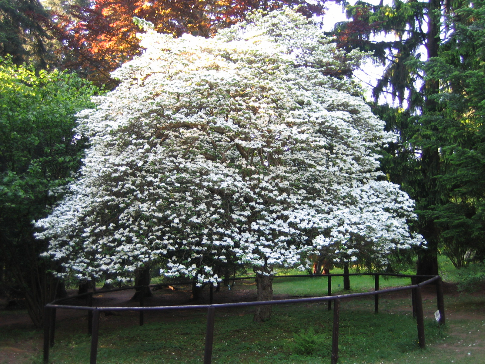 dřín květnatý (cornus florida)